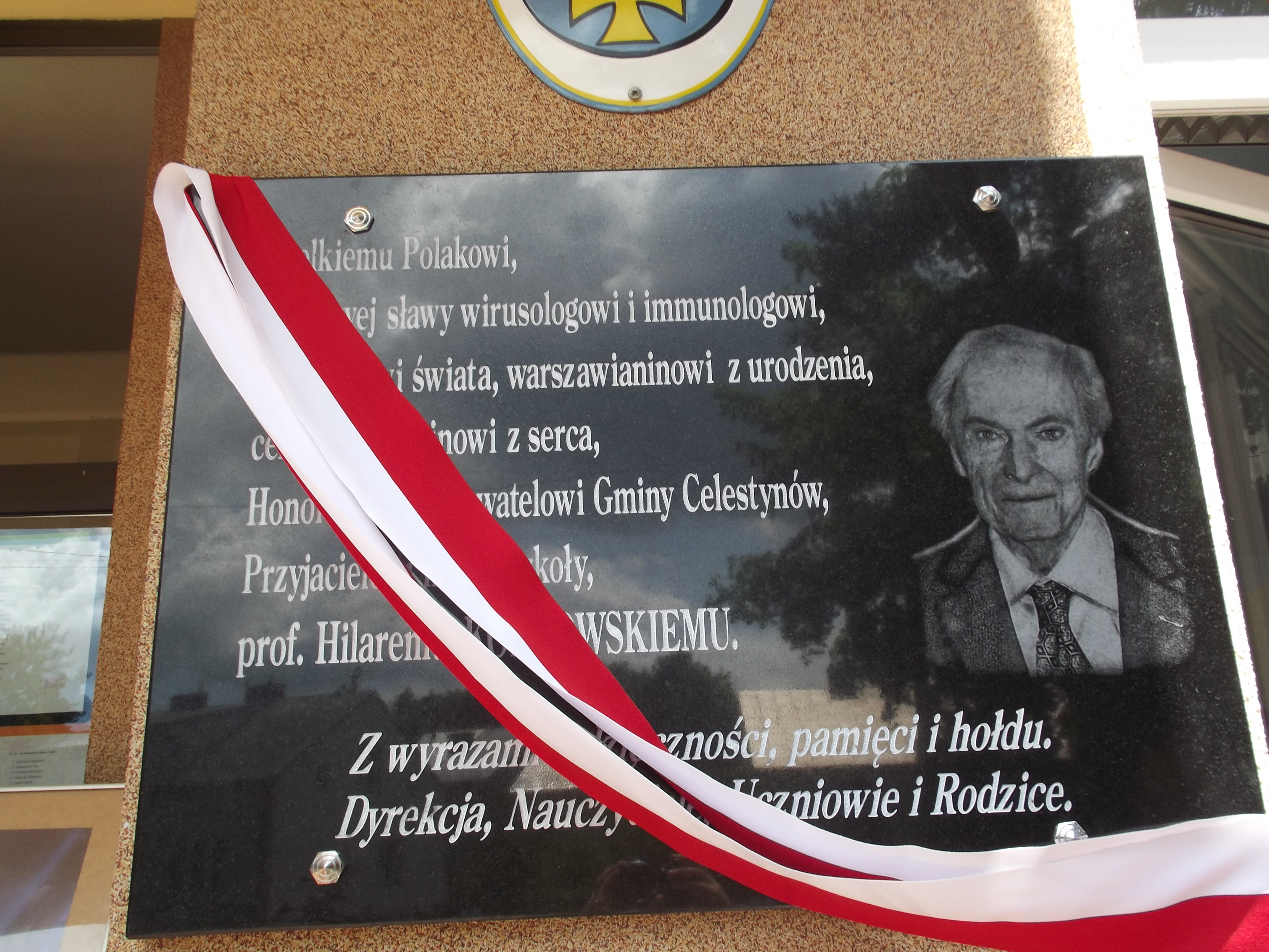 Tablica upamiętniająca profesora Hilarego Koprowskiego na ścianie szkoły w Celestynowie